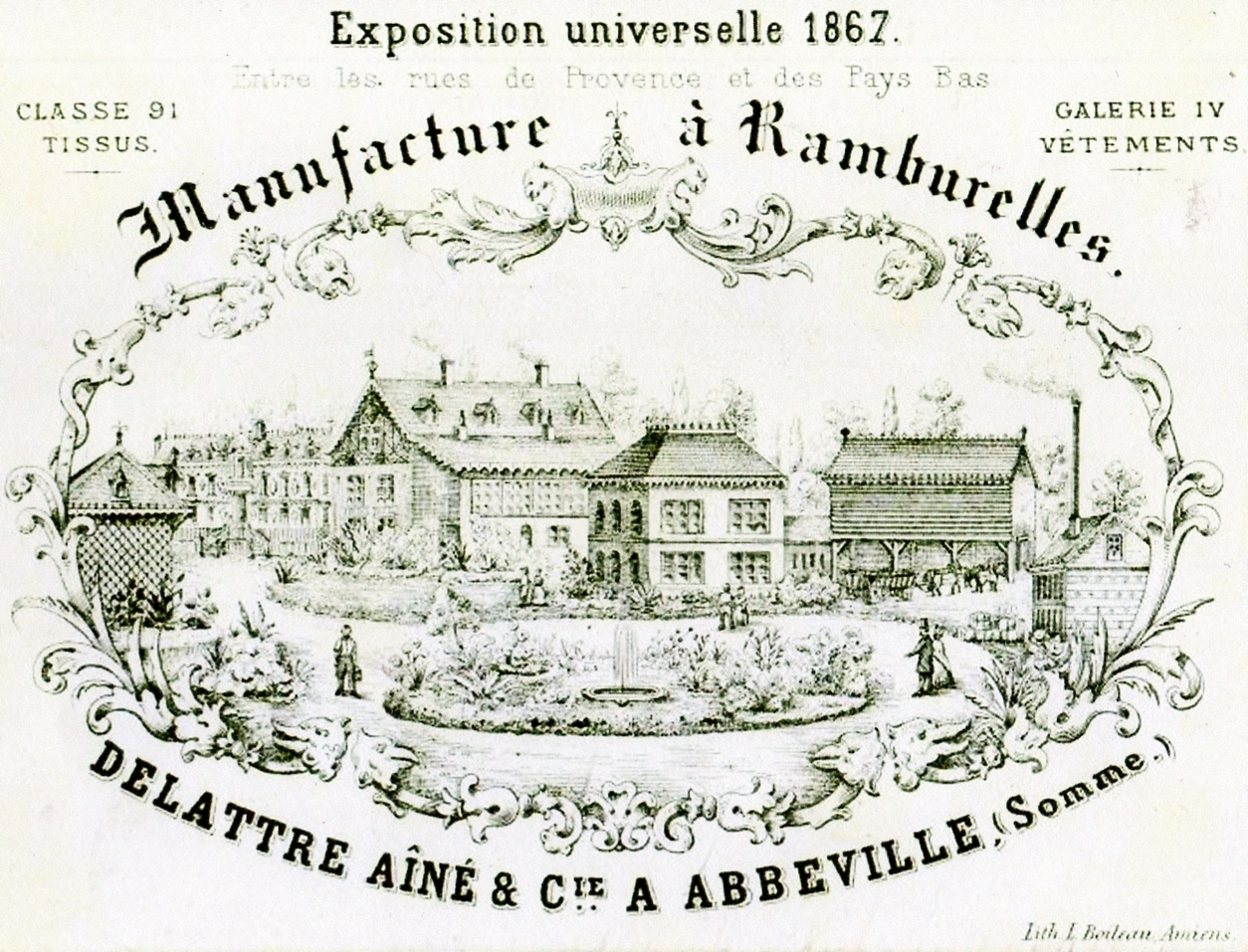 Carte de visite créée en 1867 pour exposition universelle Paris par la Manufacture DELATTRE Ainé de Ramburelles et dessin de la propriété telle qu'elle existait à l'époque.